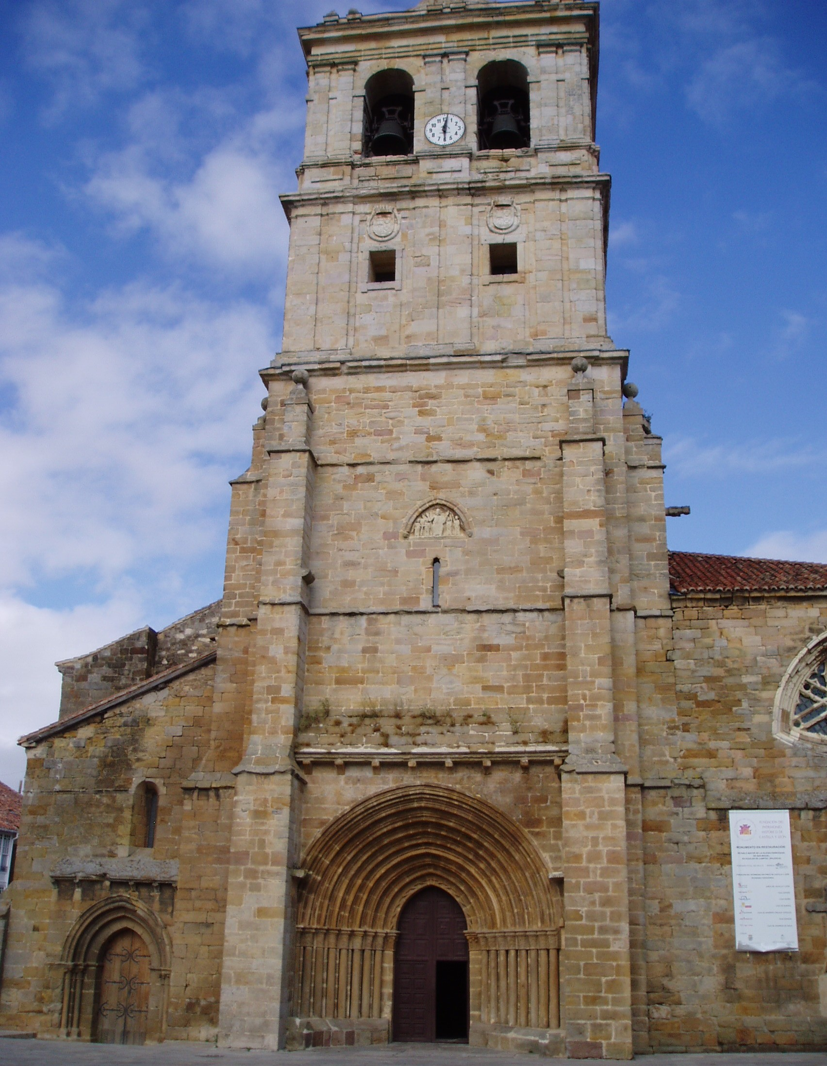 Colegiata de San Miguel. Aguilar de Campoo. Palencia. España